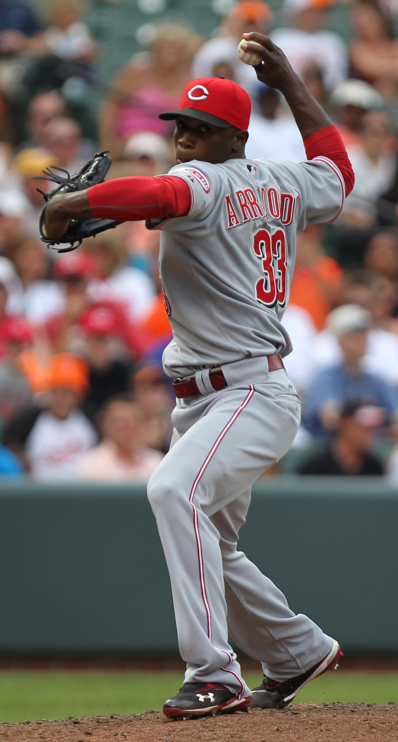 José Arredondo